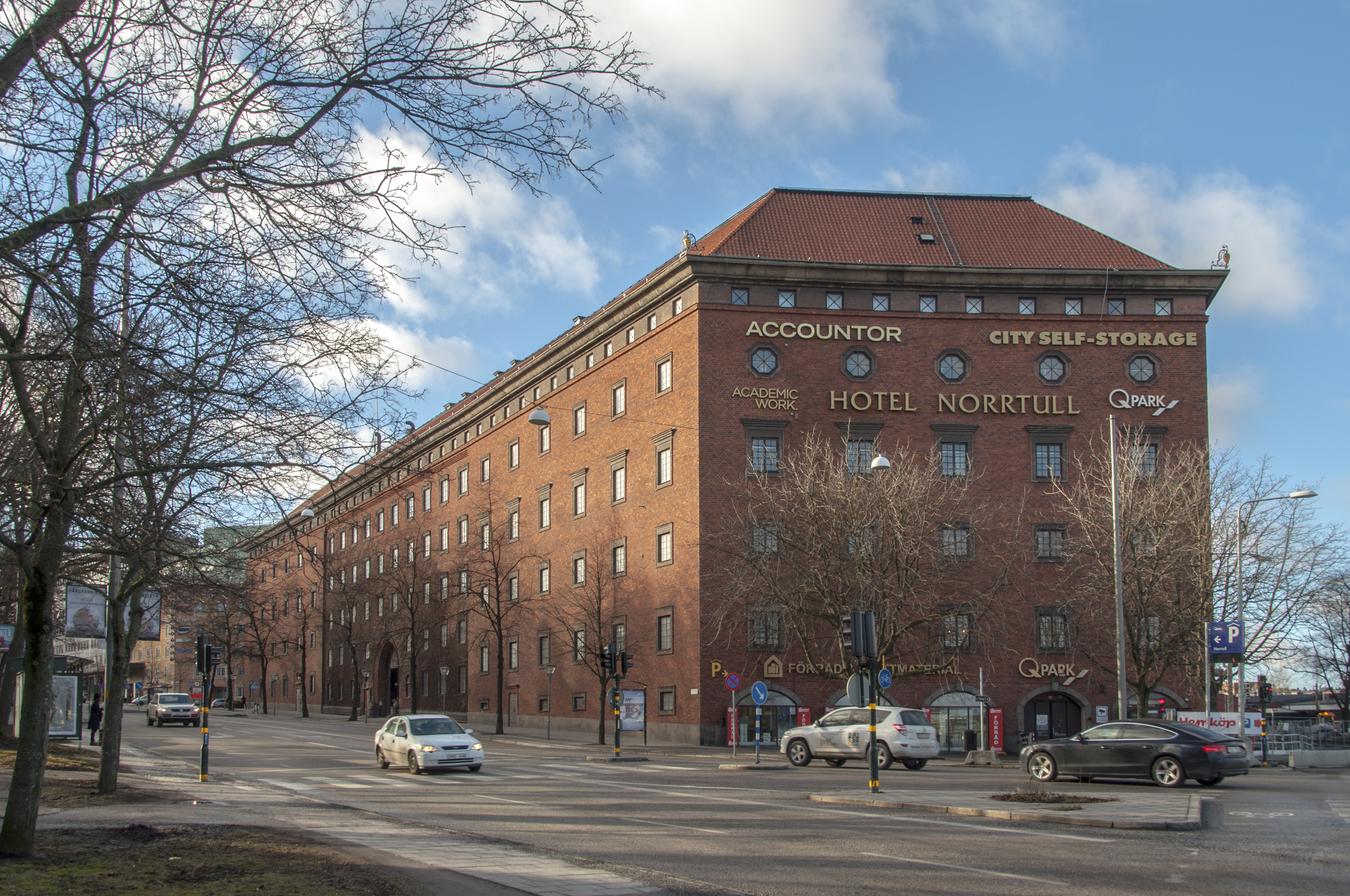 Grönstedska palatset, Städet 9, Nybyggnadsår 1920 - 1924, Cyrillus Johansson (Arkitekt) F. G. Larsson (Byggmästare) Städet AB (Byggherre)